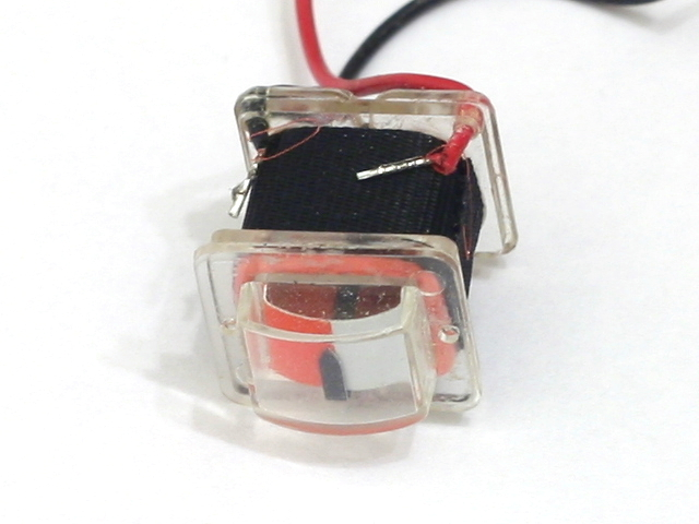 Miniature magnetoelectric VU meter